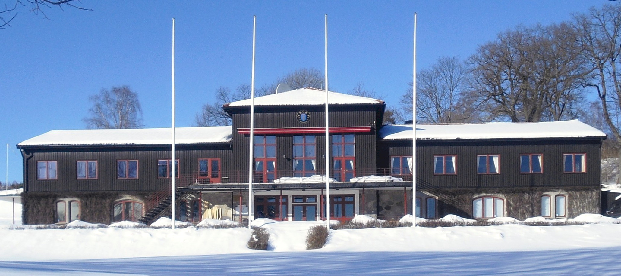 Stockholms golfklubbs klubbhus i Kevinge, Danderyd, mars 2010, före detta ladugården till Kevinge gård